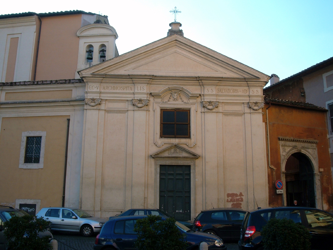 Chiesa dei Santi Andrea e Bartolomeo, a Roma, nel rione Monti, presso l'Ospedale di San Giovanni.